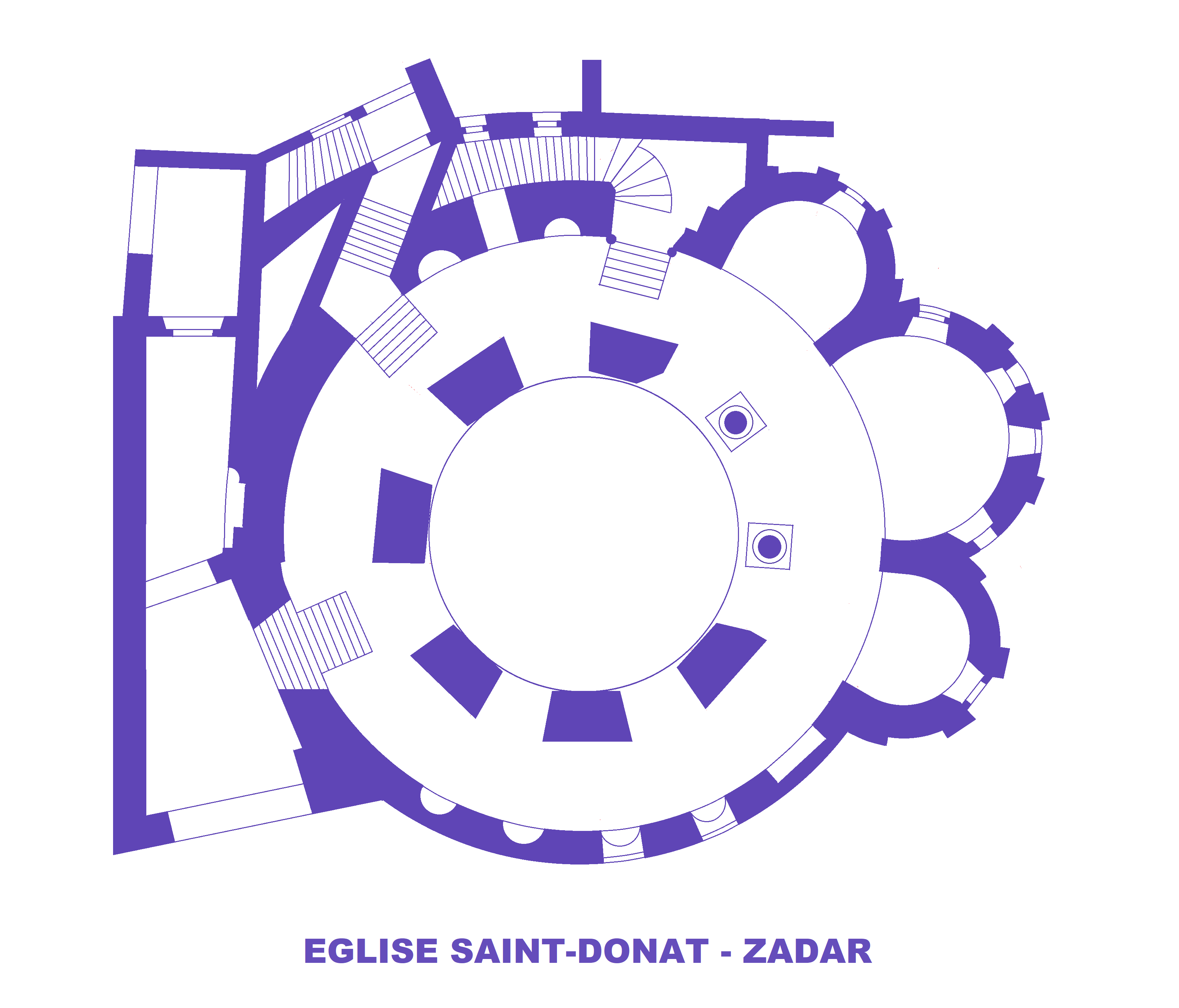 Eglise Saint-Donat, Zadar, Plan